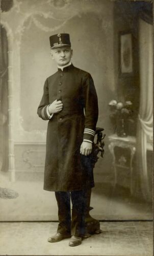 Izidor Cankar kot vojni kurat